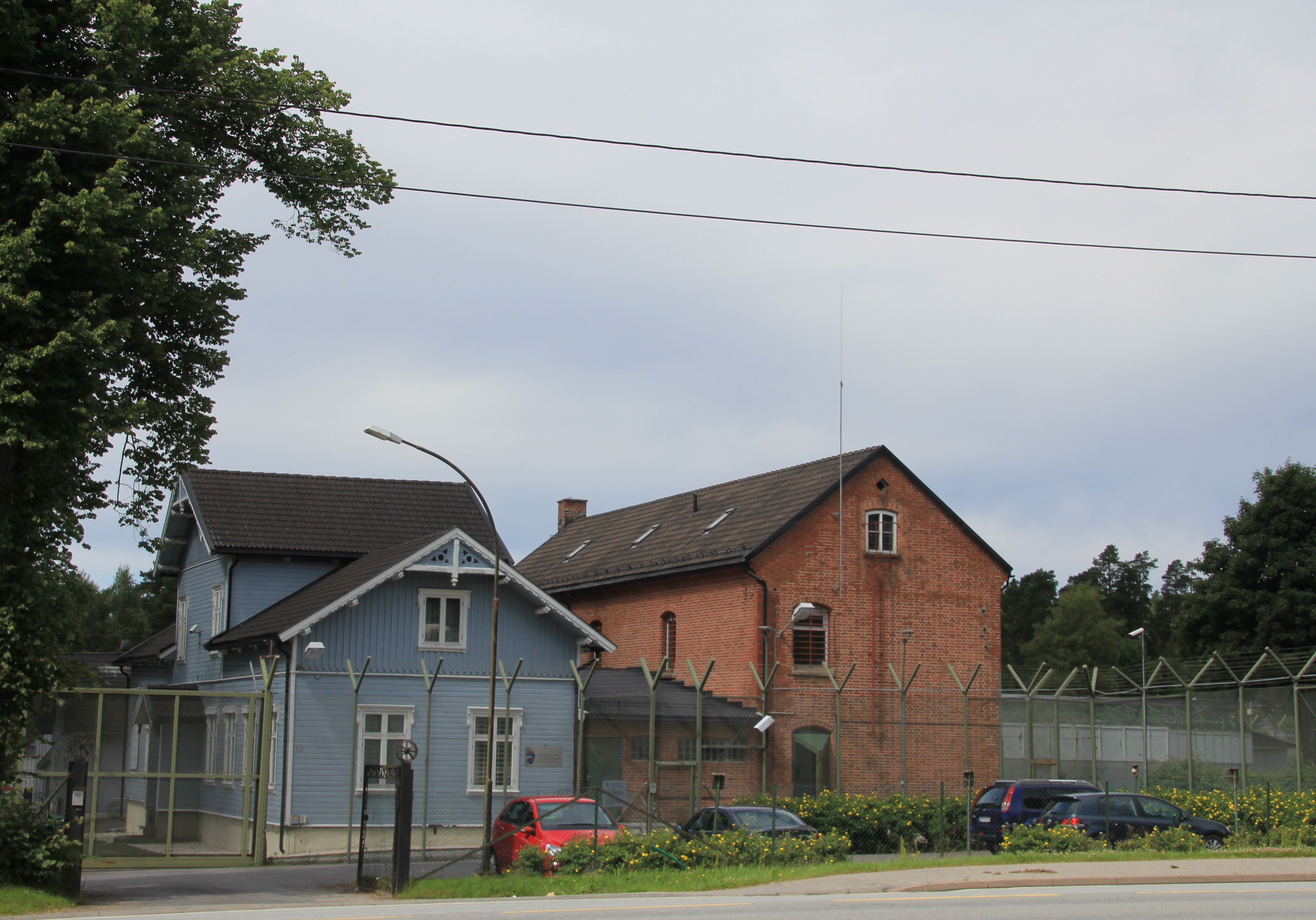 Indre Østfold fengsel, avdeling Mysen.